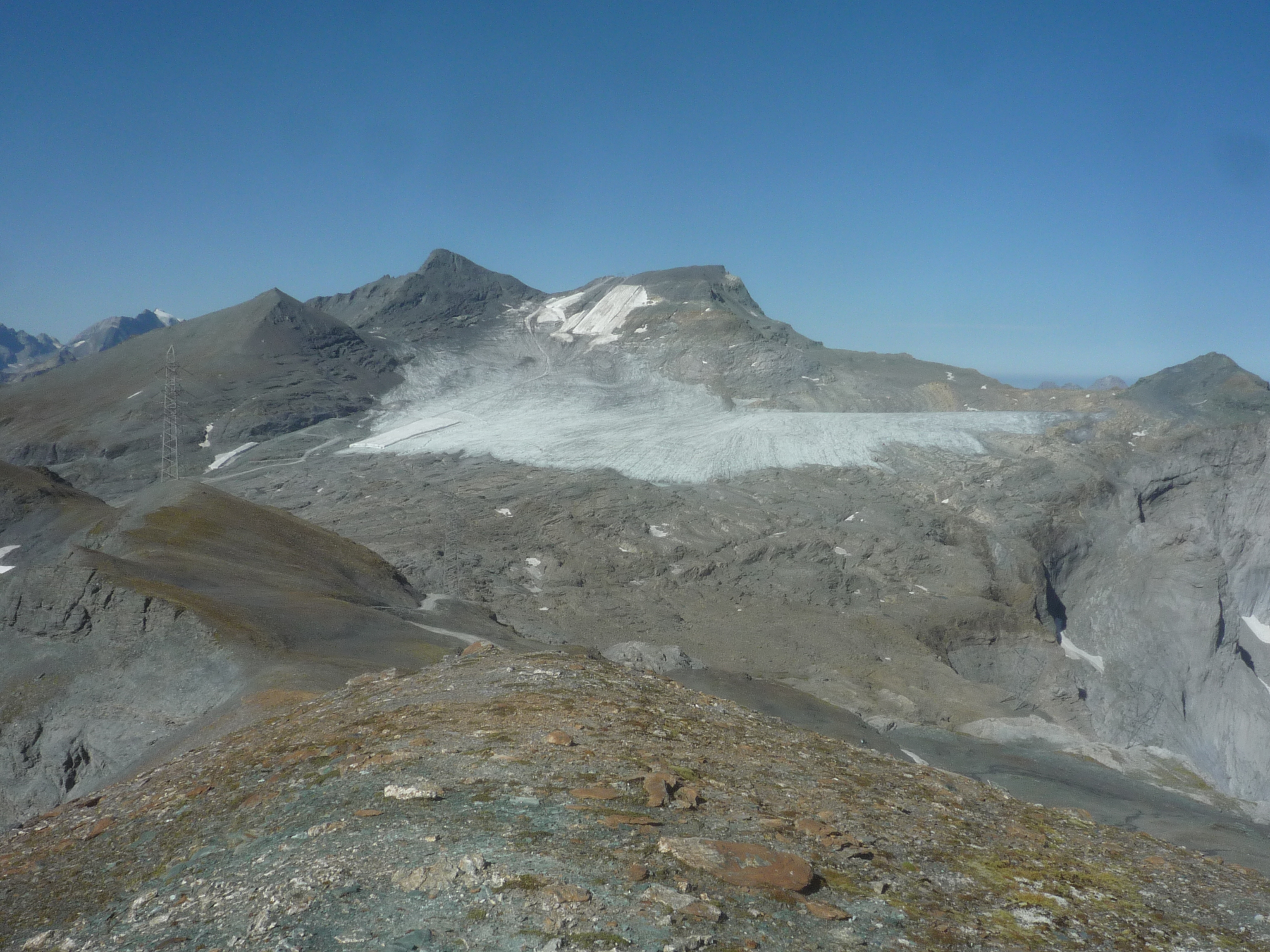 Vorab vom Westkamm des Piz Grisch, im Vordergrund links der höchstgelegene Mast der Vorableitung